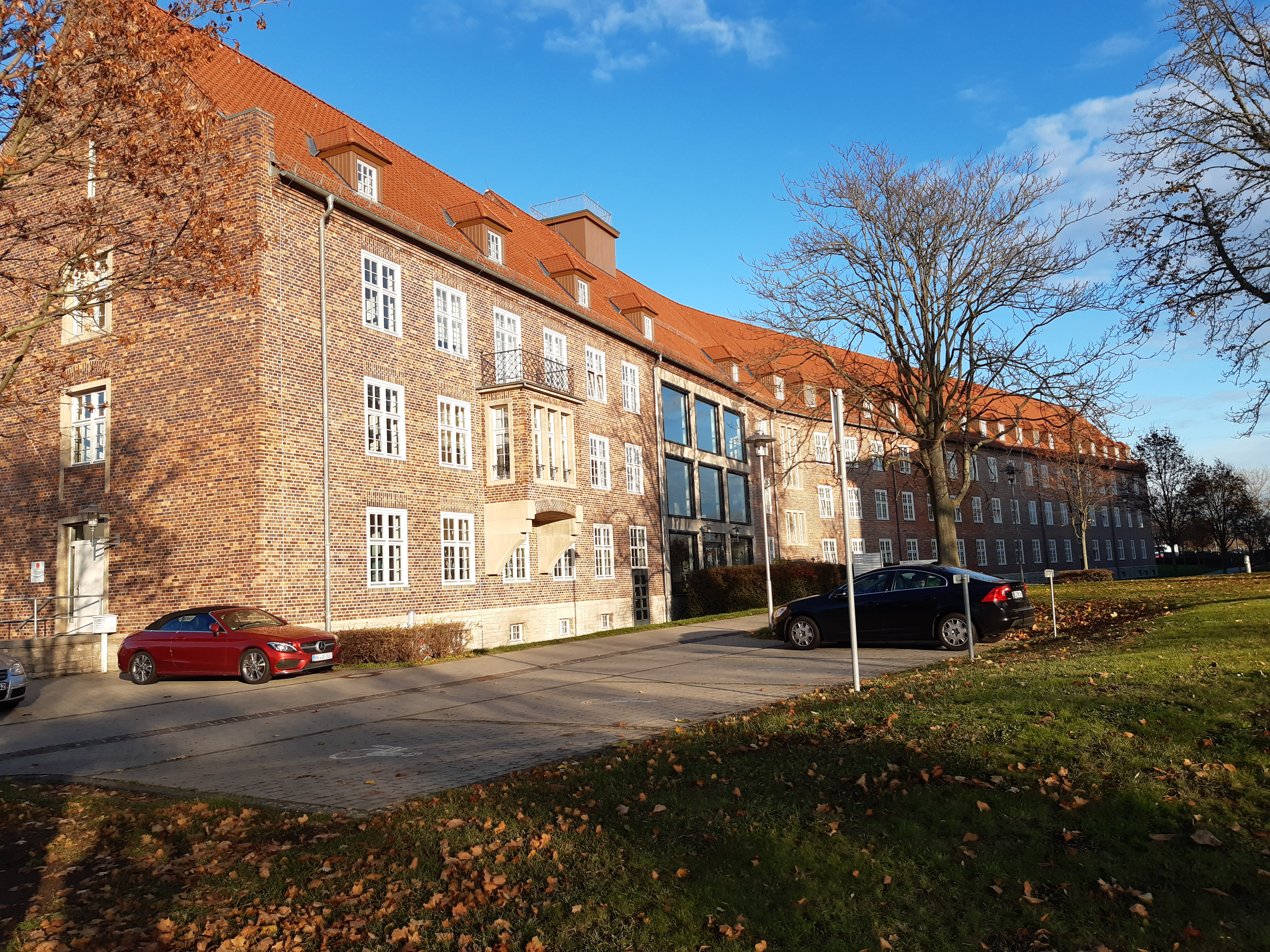 Verwaltungsgebäude